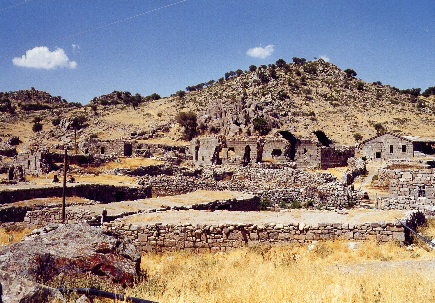 Madenşehri, türkischer Ort im Gebiet Binbirkilise bei Karaman